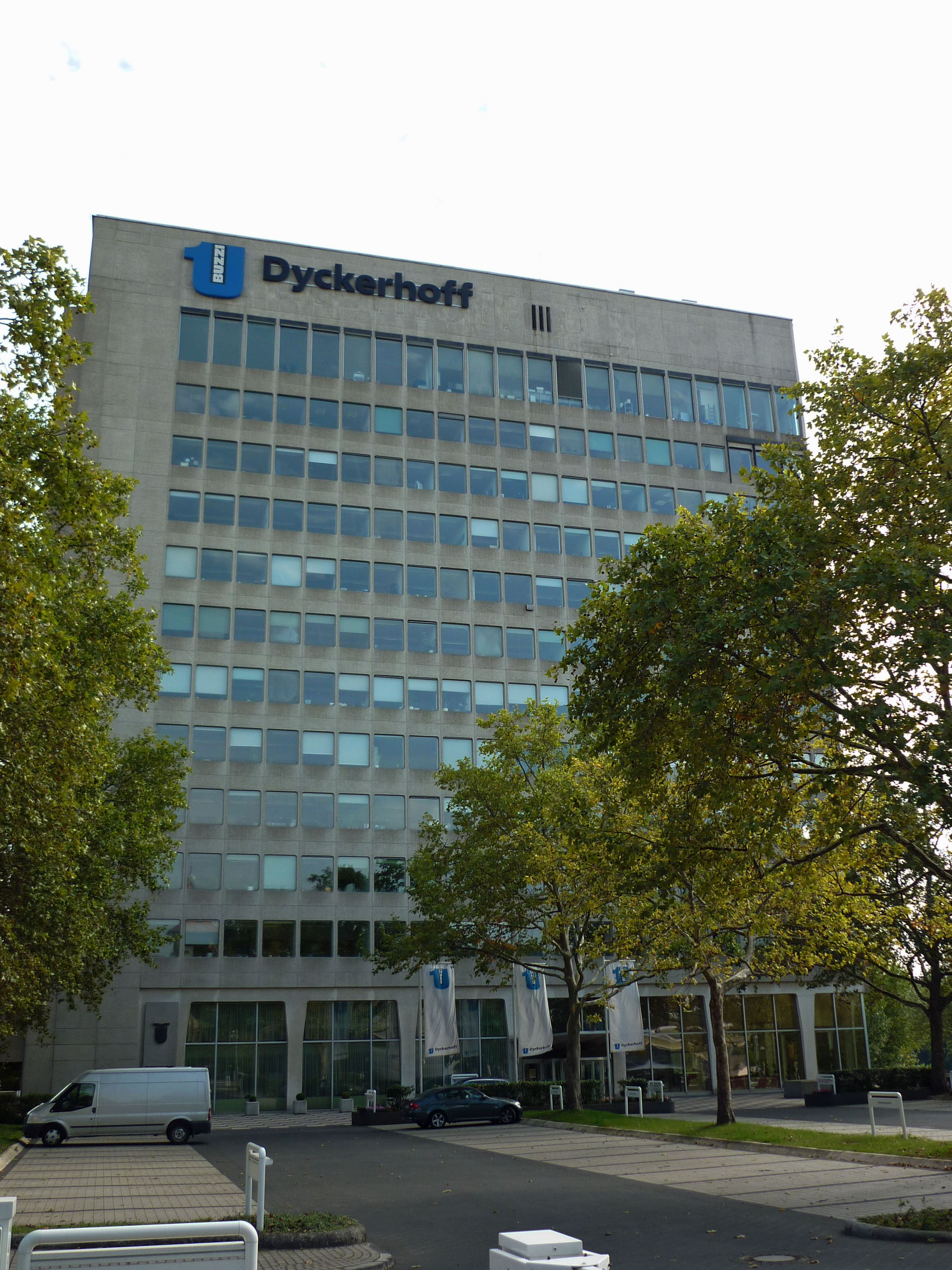 Die Dyckerhoff-Zentrale in Mainz-Amöneburg mit neuem Logo von Buzzi-Unicem im September 2013.